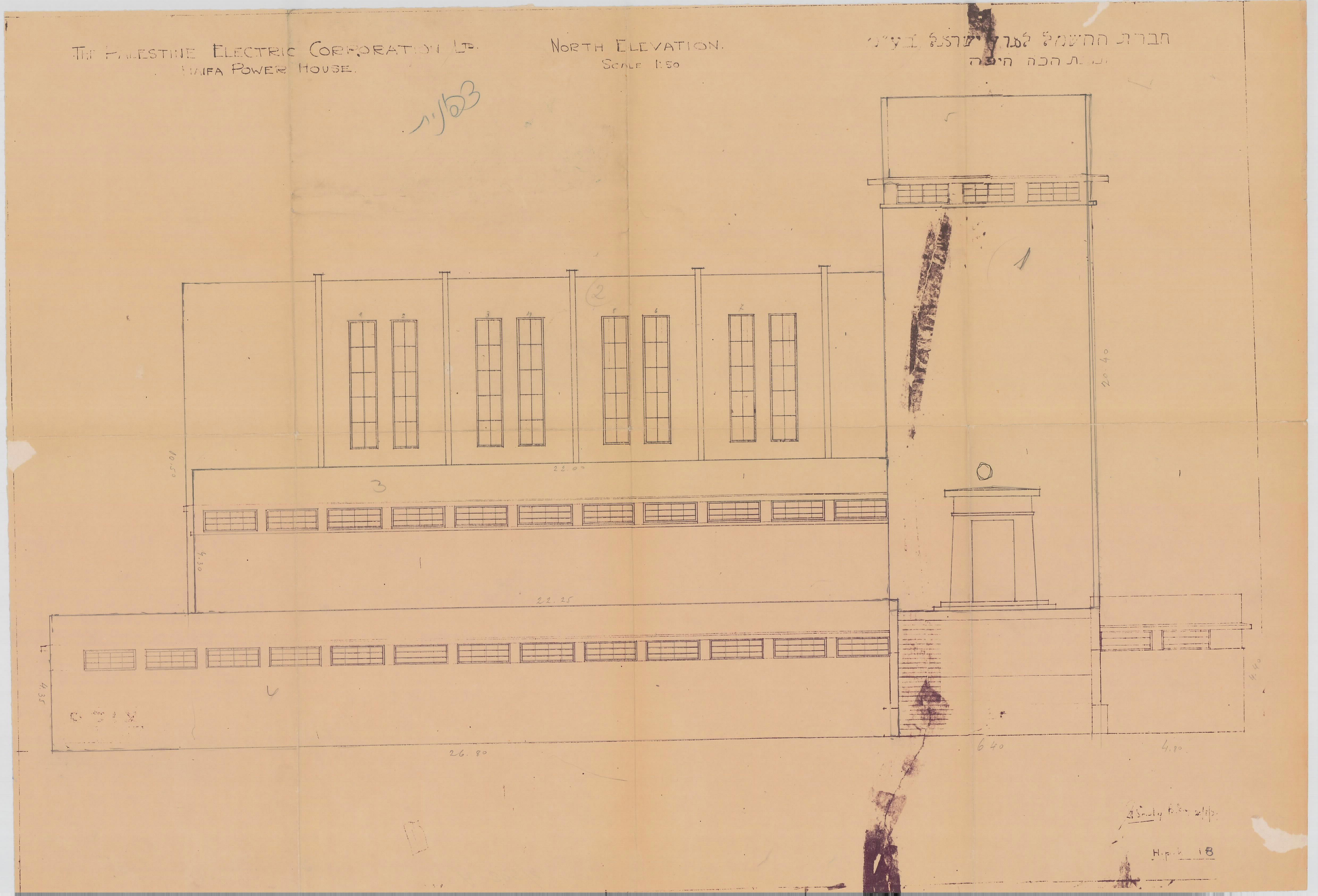 שרטוט חזית תחנת הכוח הראשונה בחיפה